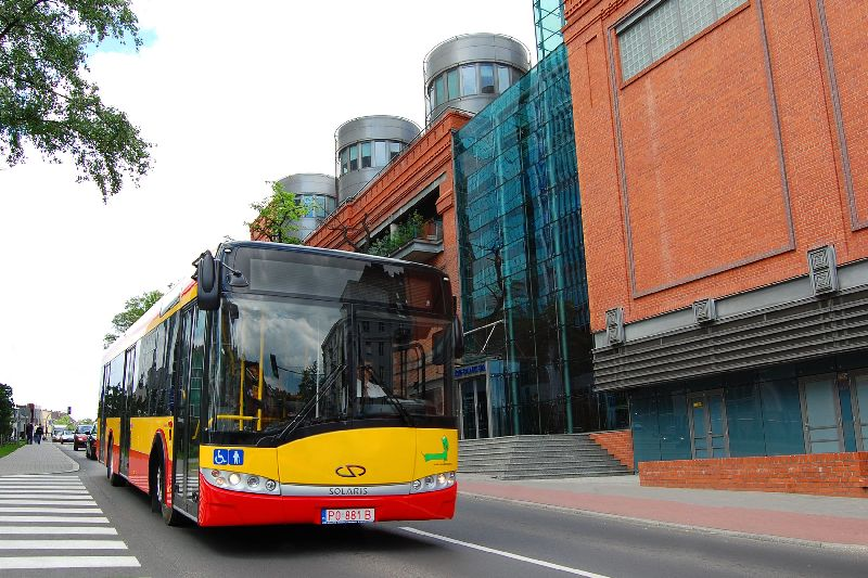 Urbino 12